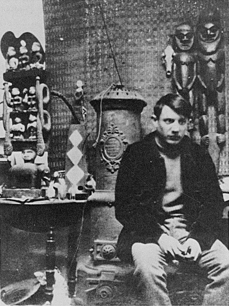 Pablo Picasso in Montmartre studio with his African sculpture collection, 1908